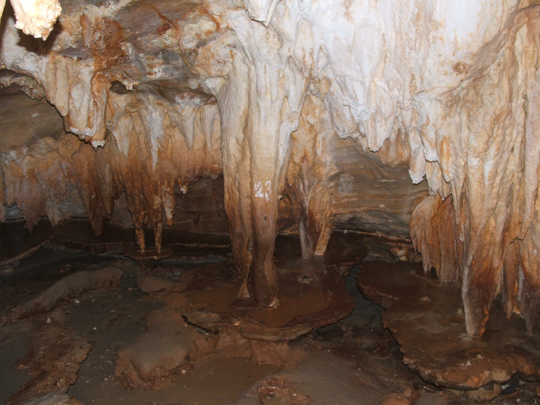 Grotte di Toirano, a Toirano, Savona, Liguria, Italia